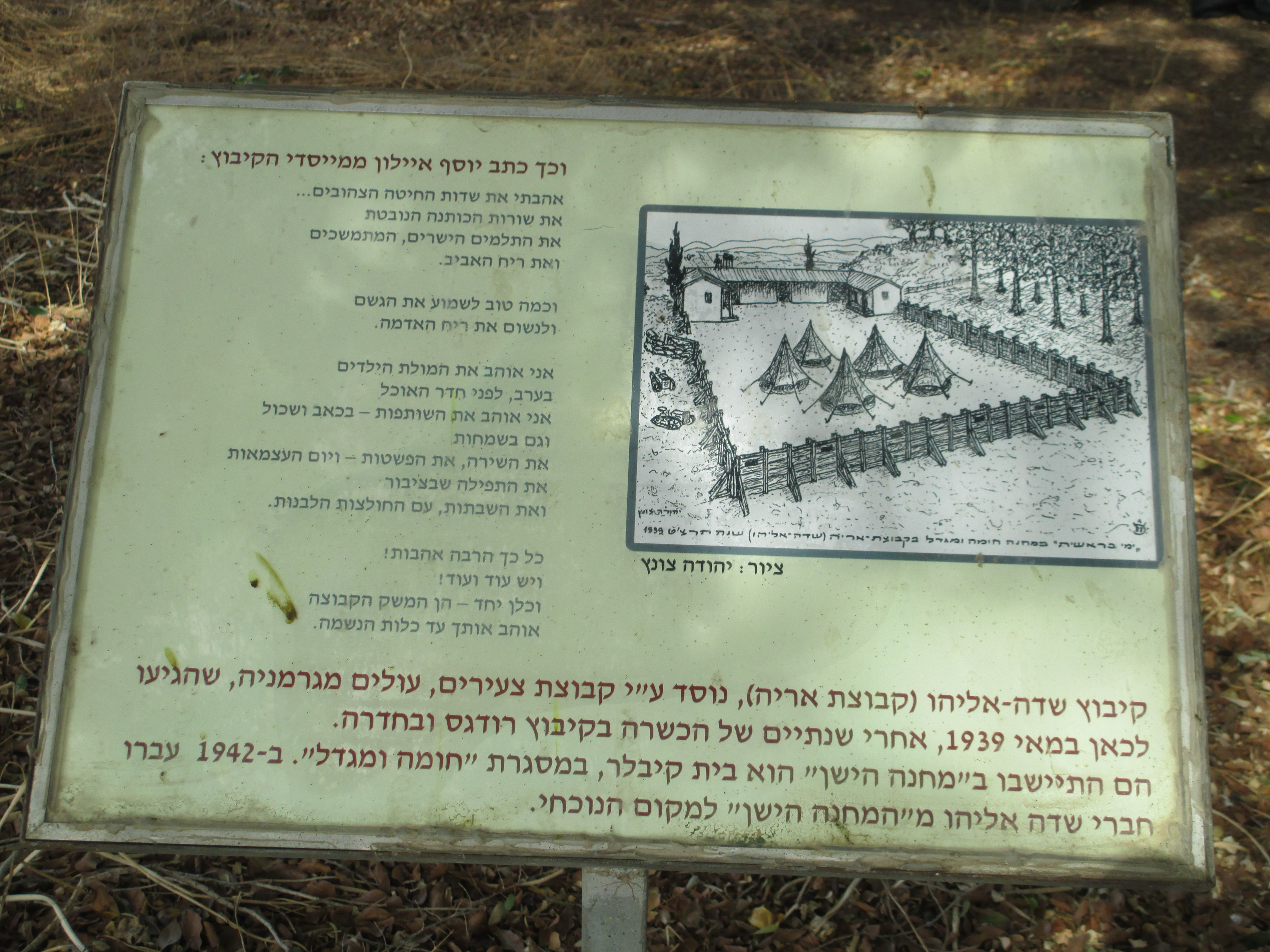 שלט ב"חורשת הבית האדום" מול קיבוץ שדה אליהו